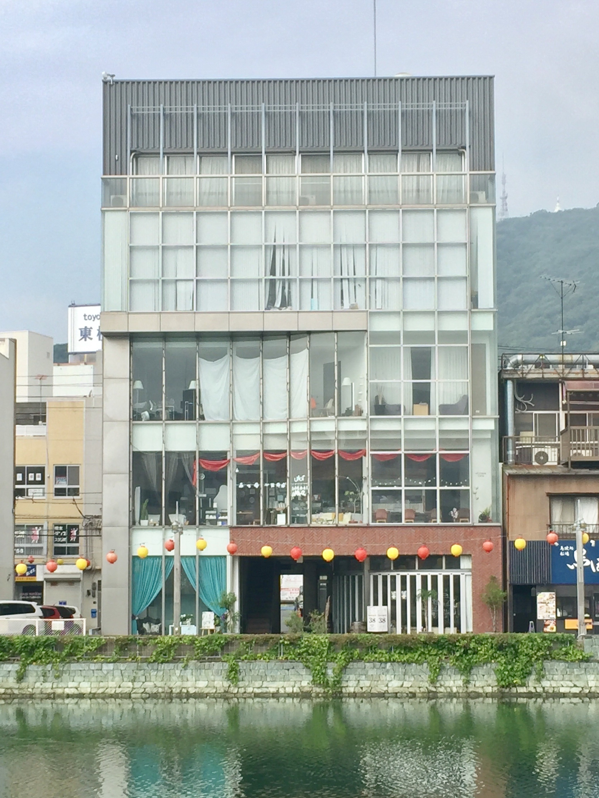 しんまちボードウォーク沿いにある国際東船場113ビル新館の外観。